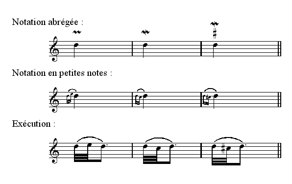 Description : Mordant Source : Personnelle Licence : GFDL